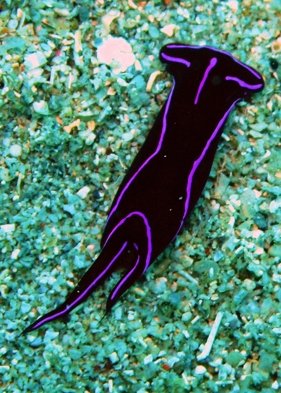 Cephalaspidea. Chelidonura varians. Taken at Tasik Ria, Northe Sulawesi, Indonesia.